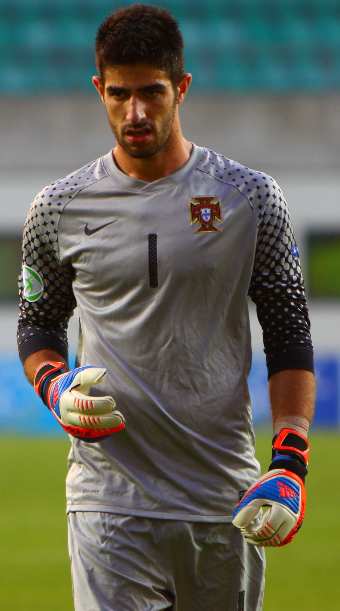 U-19 Portugal vs Spain.